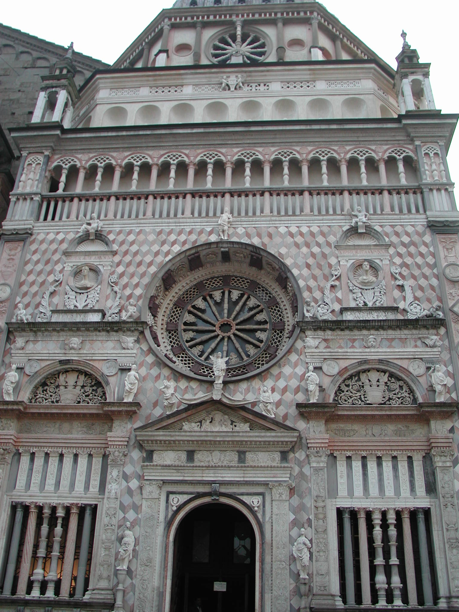 Bergamo, Lombardia, Italia. Cappella Colleoni - facciata - particolare. Bergamo, Lombardia, Italy. Colleoni chapel. Facade detail. Foto fatta da me october 2005